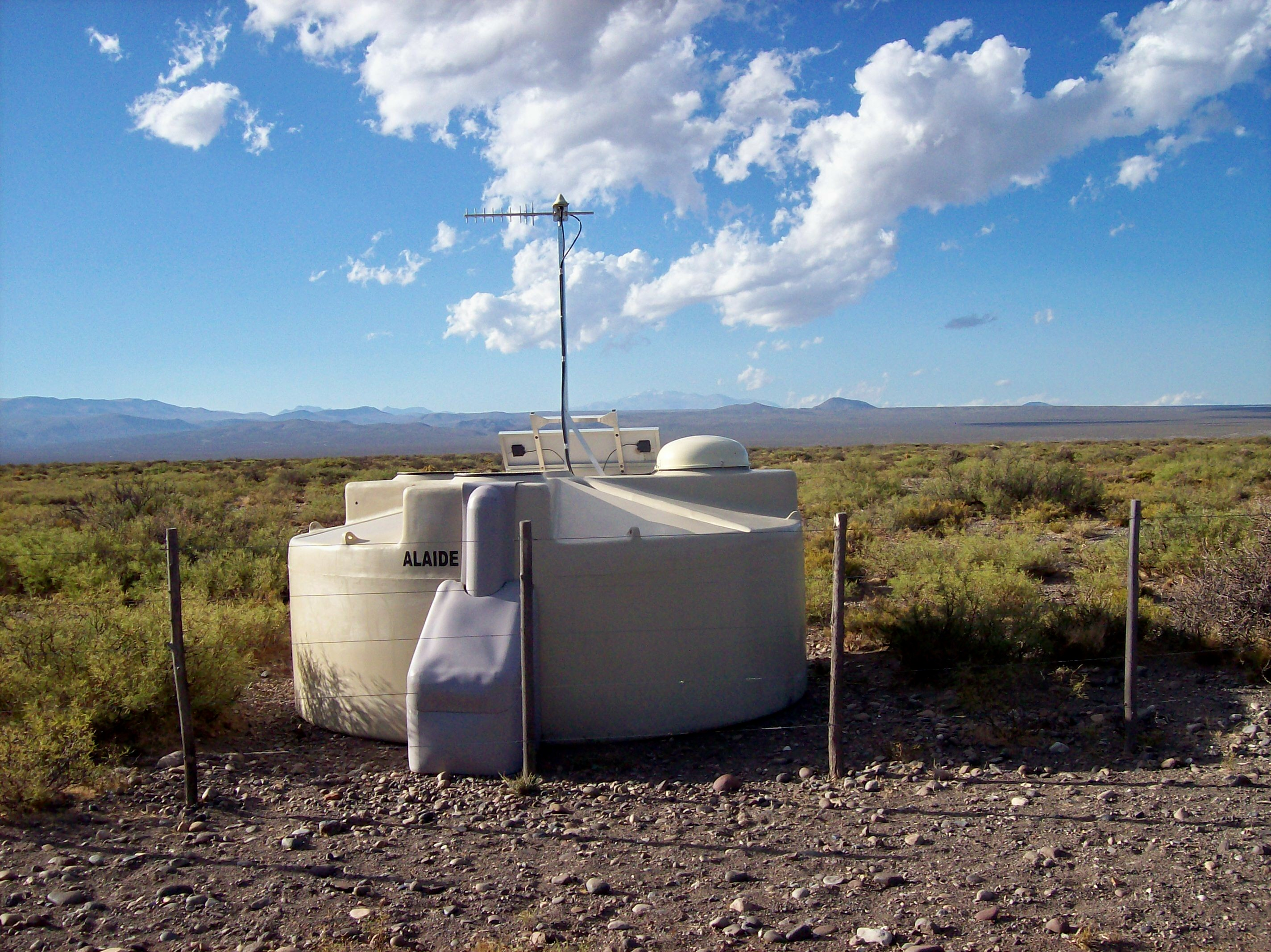 Observatorio Pierre Auger, en Malargüe, Argentina. Detector de rayos cósmicos en un campo de Pampa Amarilla